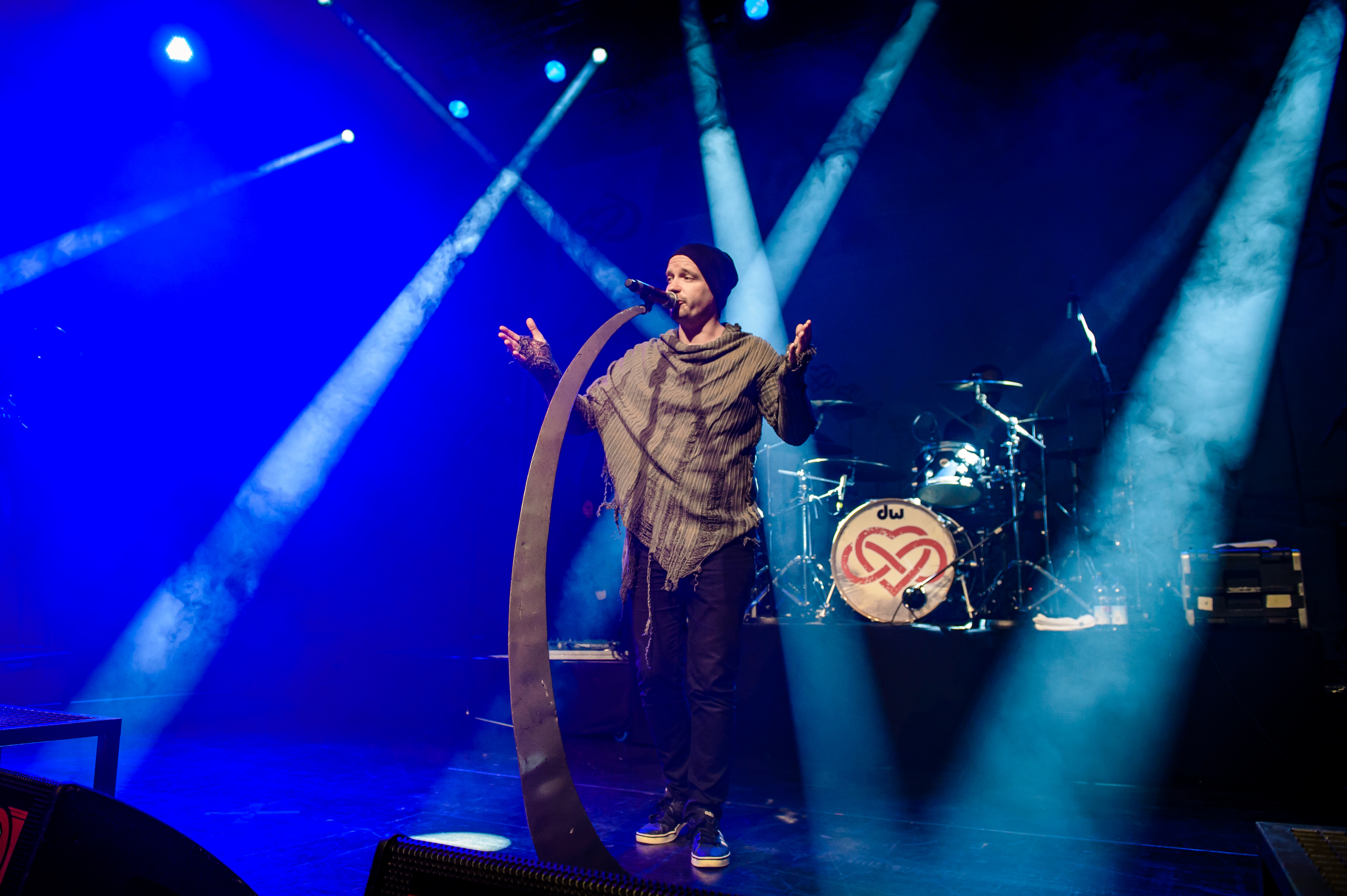 'Amphi Festival 2017; Tanzbrunnen Köln': 'Letzte Instanz '